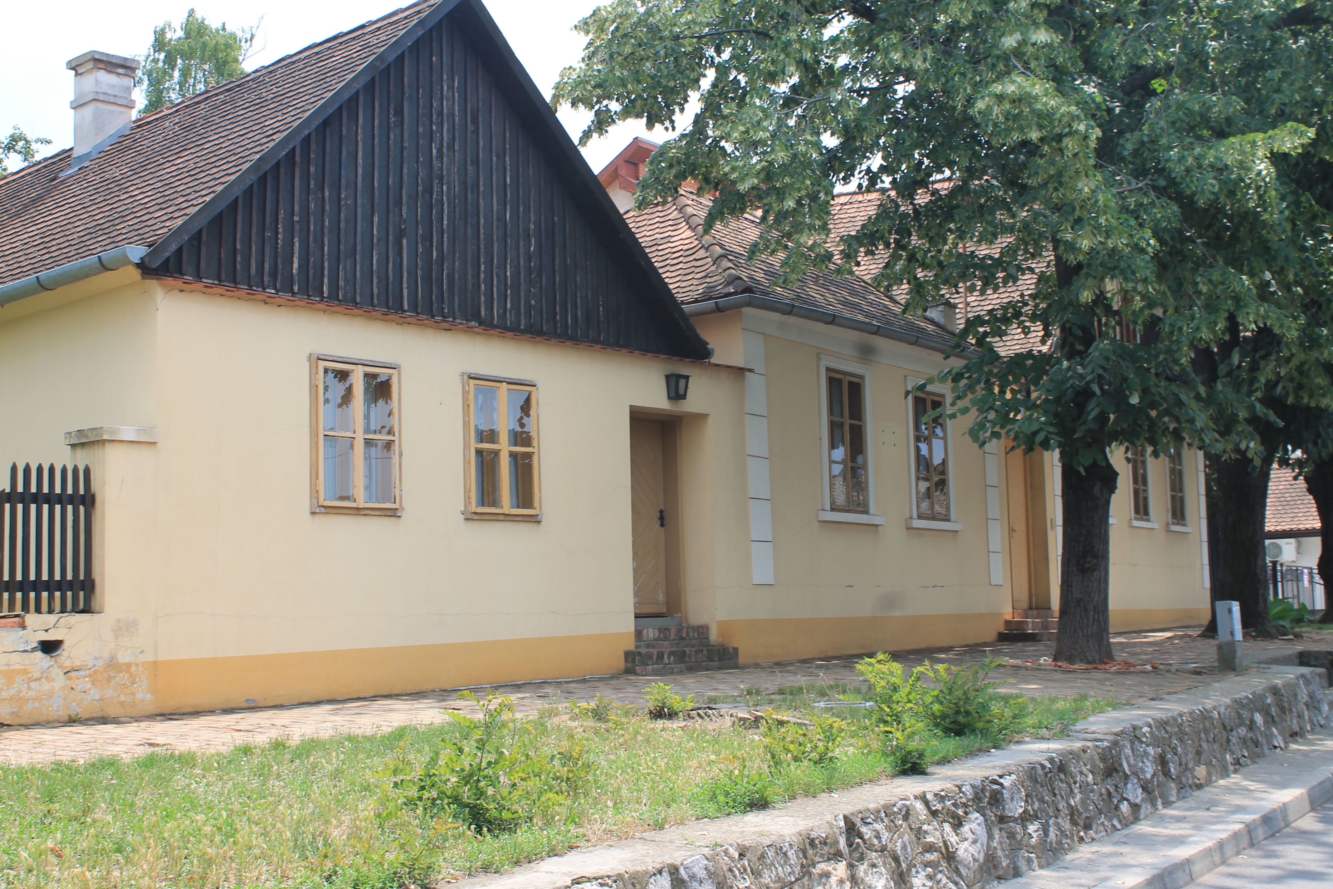 Kuća u kojoj je živeo Jovan Jovanović Zmaj u Sremskoj Kamenici